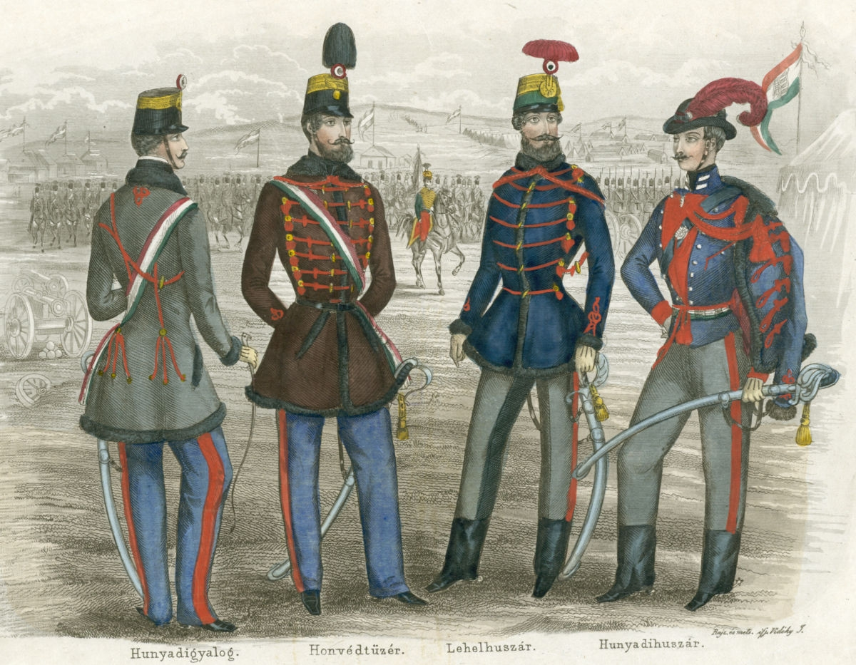 Egyenruharajzok a szabadságharcból 1526 utáni gyűjtemény – 1849/49-es és emigrációs iratok gyűjteménye – Történelmi események és személyek képes ábrázolásai